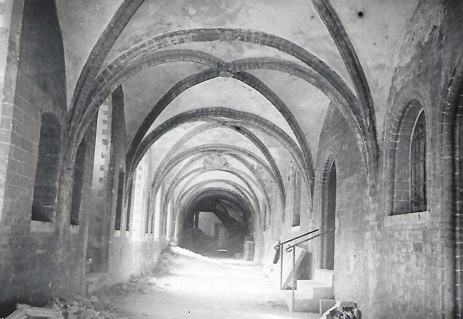 Nördlicher Kreuzgang des Klosters Dobbertin